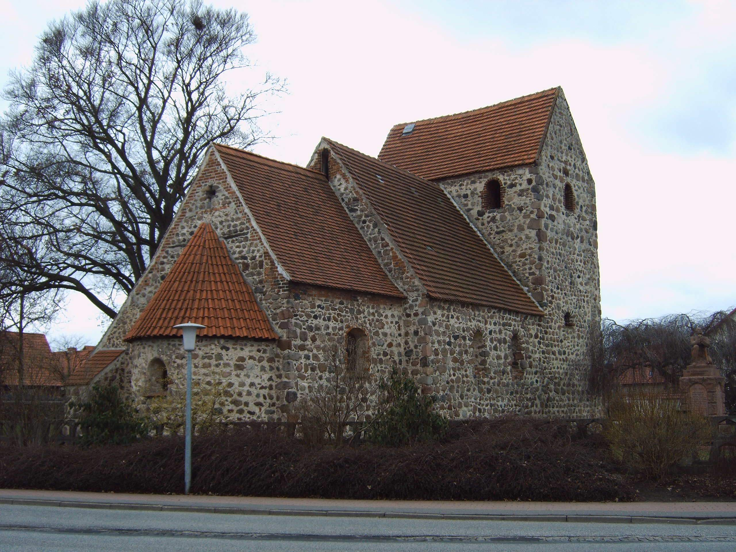 Sankt-Sebastian-Kirche in Mahlsdorf (Altmark), Deutschland